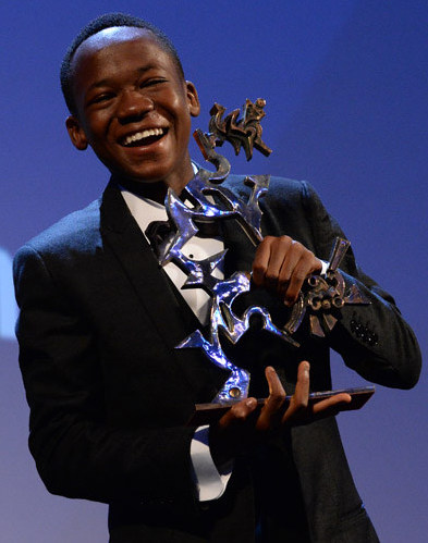 21177489789_f9d54e2be0_o